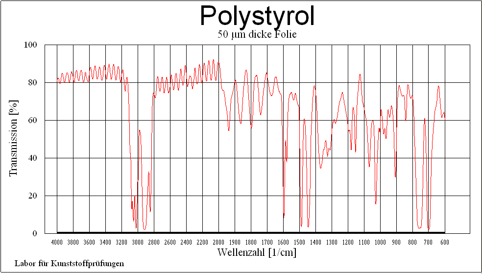 Infrarotspektrum einer 50 µm dicken Polystyrolfolie